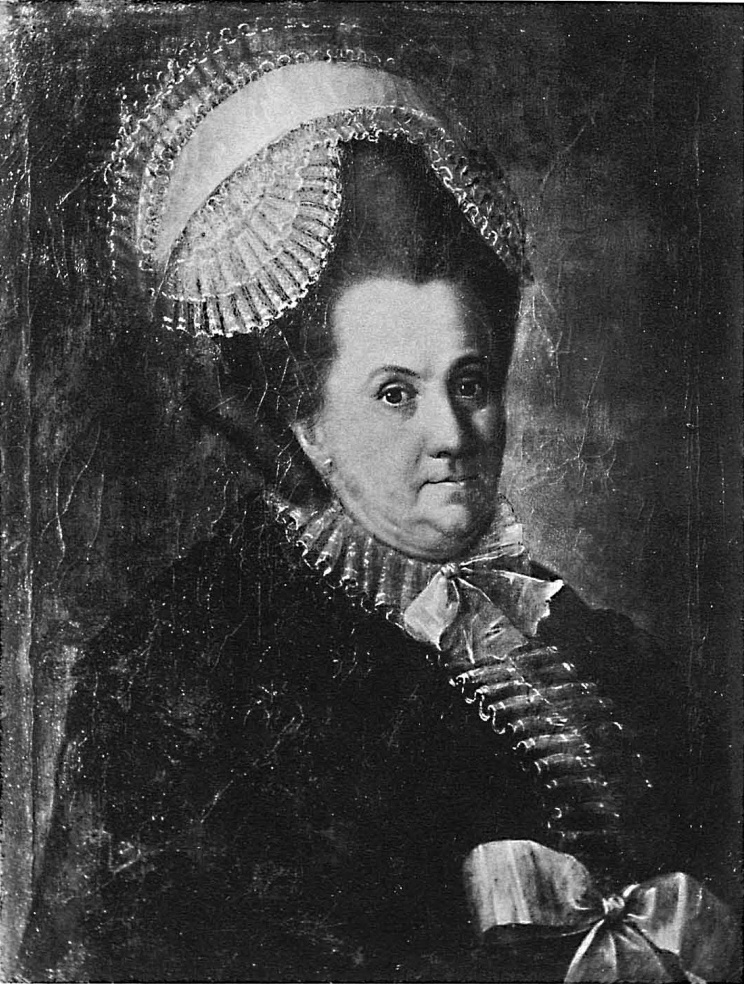 Княгиня Анастасия Васильевна Долгорукая (1723-1805)